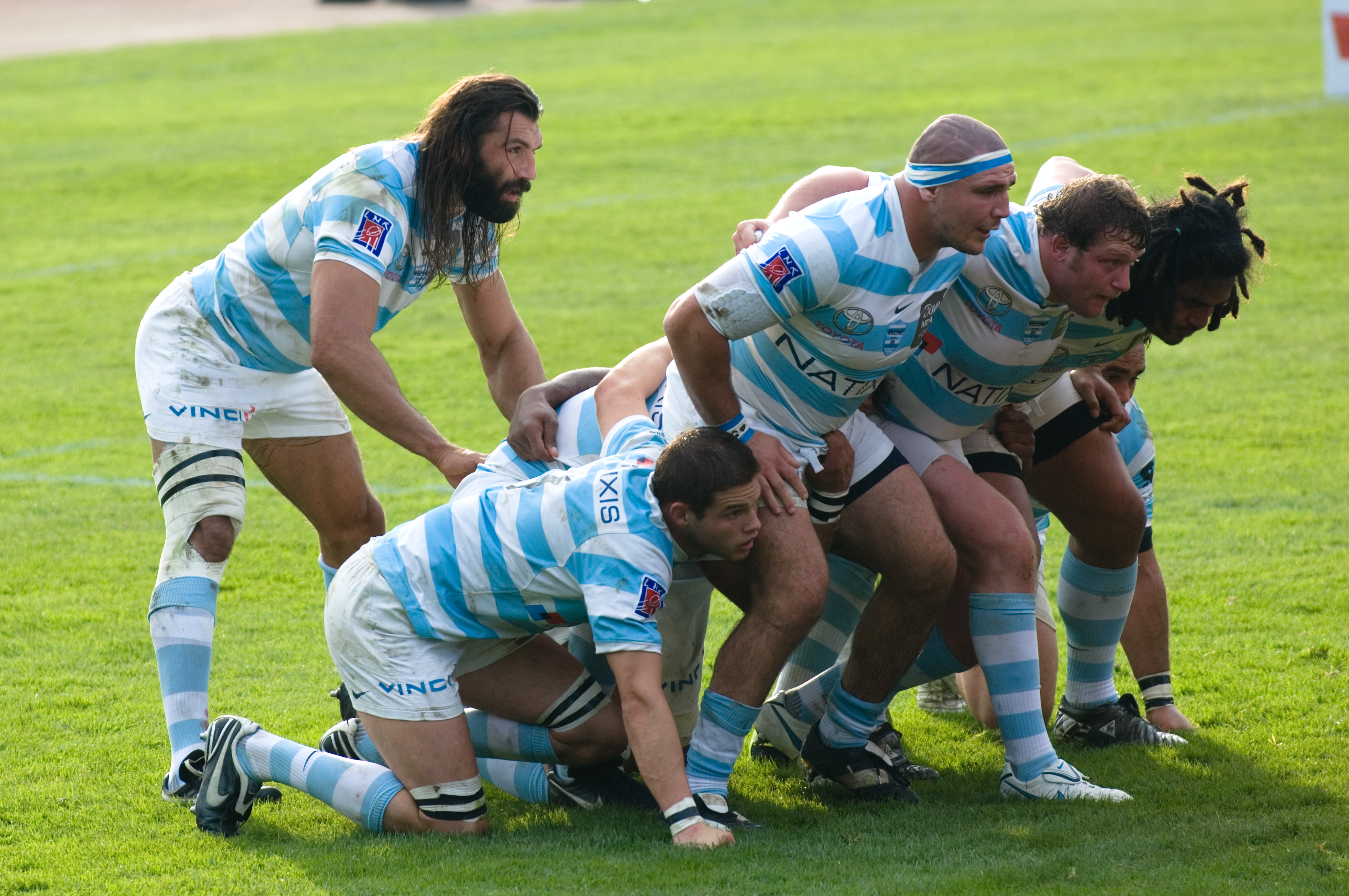 Sébastien Chabal avec le Racing Métro 92 avant une mêlée fermée contre le Stade Toulousain au stade Yves-du-Manoir à Colombes (92). Top 14 2009-2010